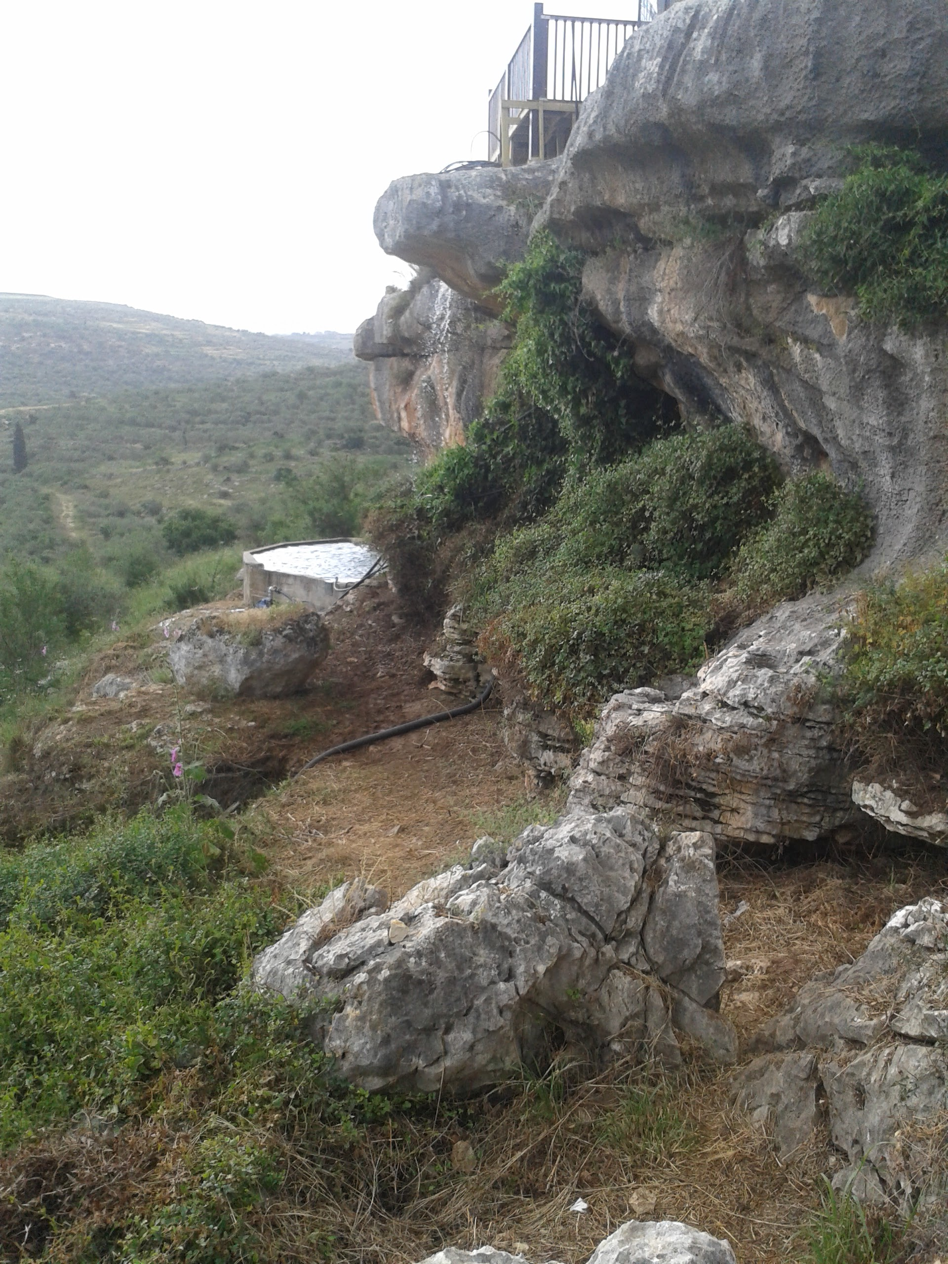 זווית נוספת של אחד הצנירים שבפארק הצנירים